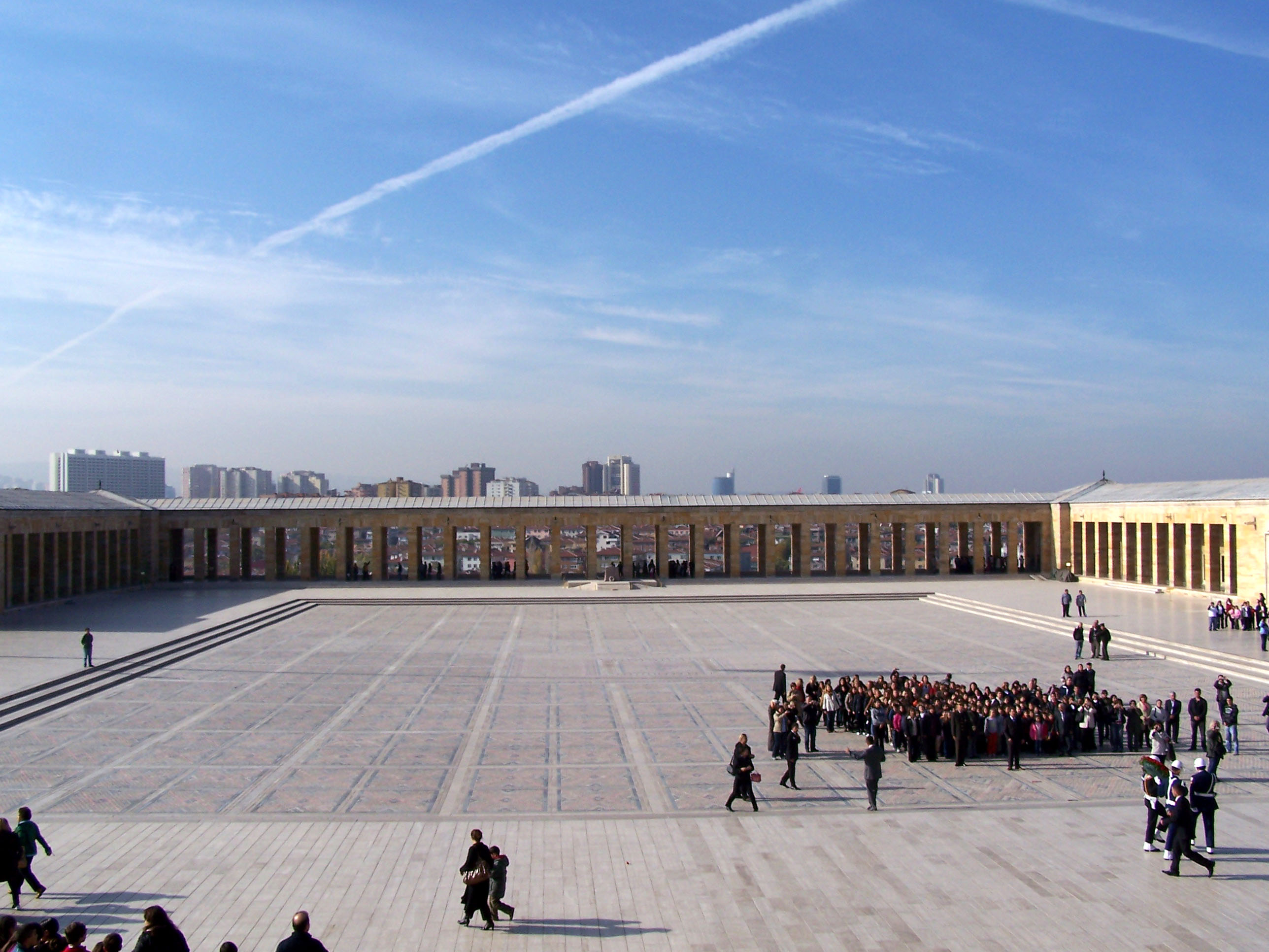 Anıtkabir Tören Meydanı